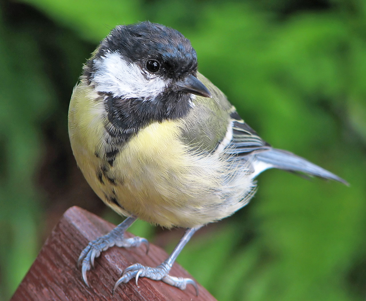 Schielmees Parus major.